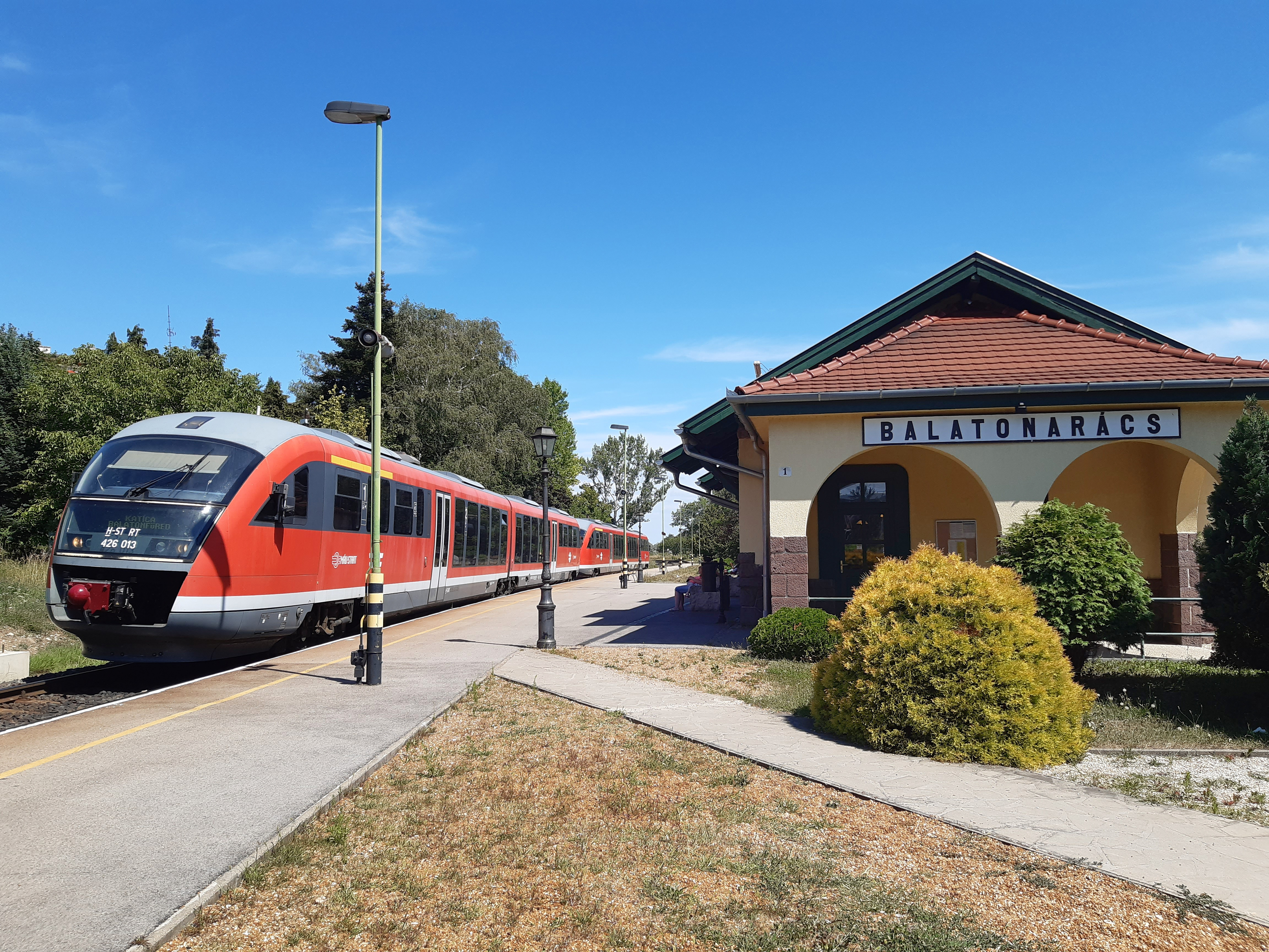 Balatonarács vasúti megállóhely